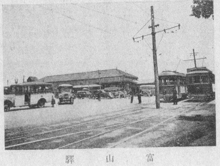 富山駅構内に乗入れを果した富山市営軌道富山駅前停留場